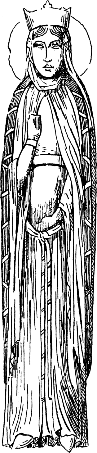 Fig. 19. — Haregonde, femme de Clotaire 1er.